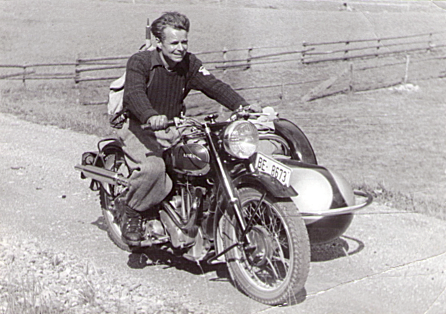 Edmund Wunderlich auf der Fahrt in die Berge; im Gepäck dabei sind Eispickel, Fotoausrüstung und Skizzenblock.